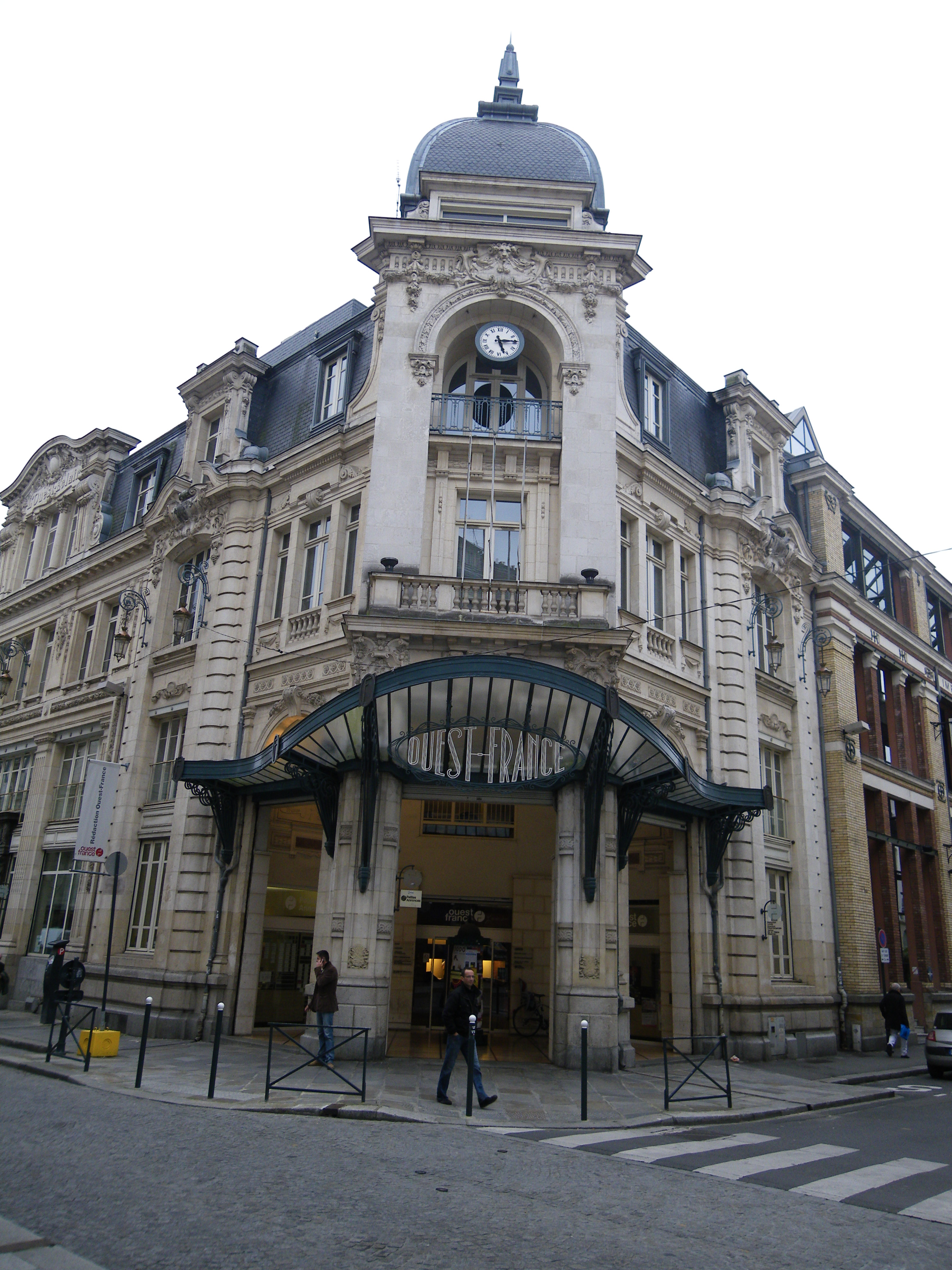 le siege du journal ouest france a rennes